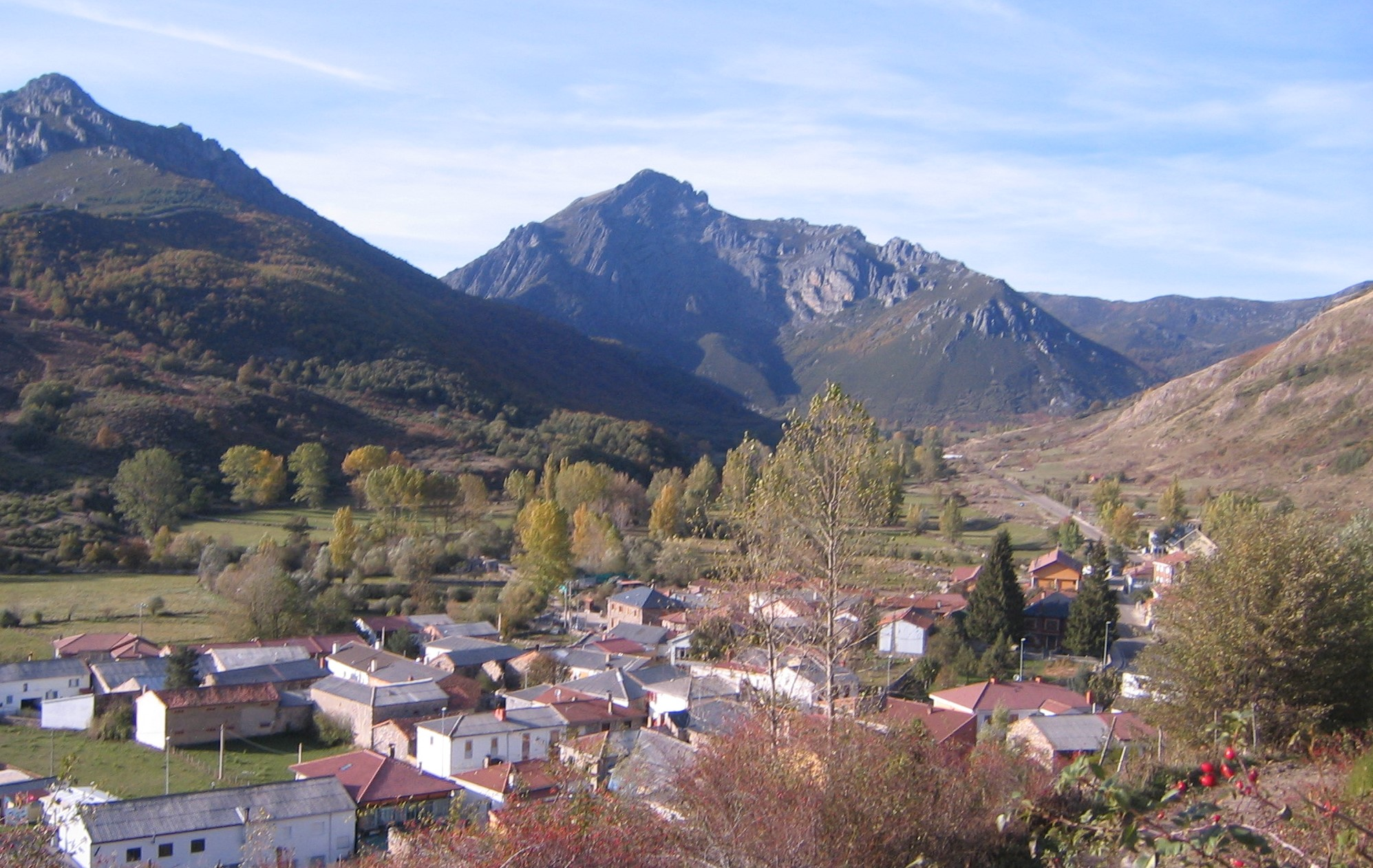 Visión del pueblo de Cofiñal